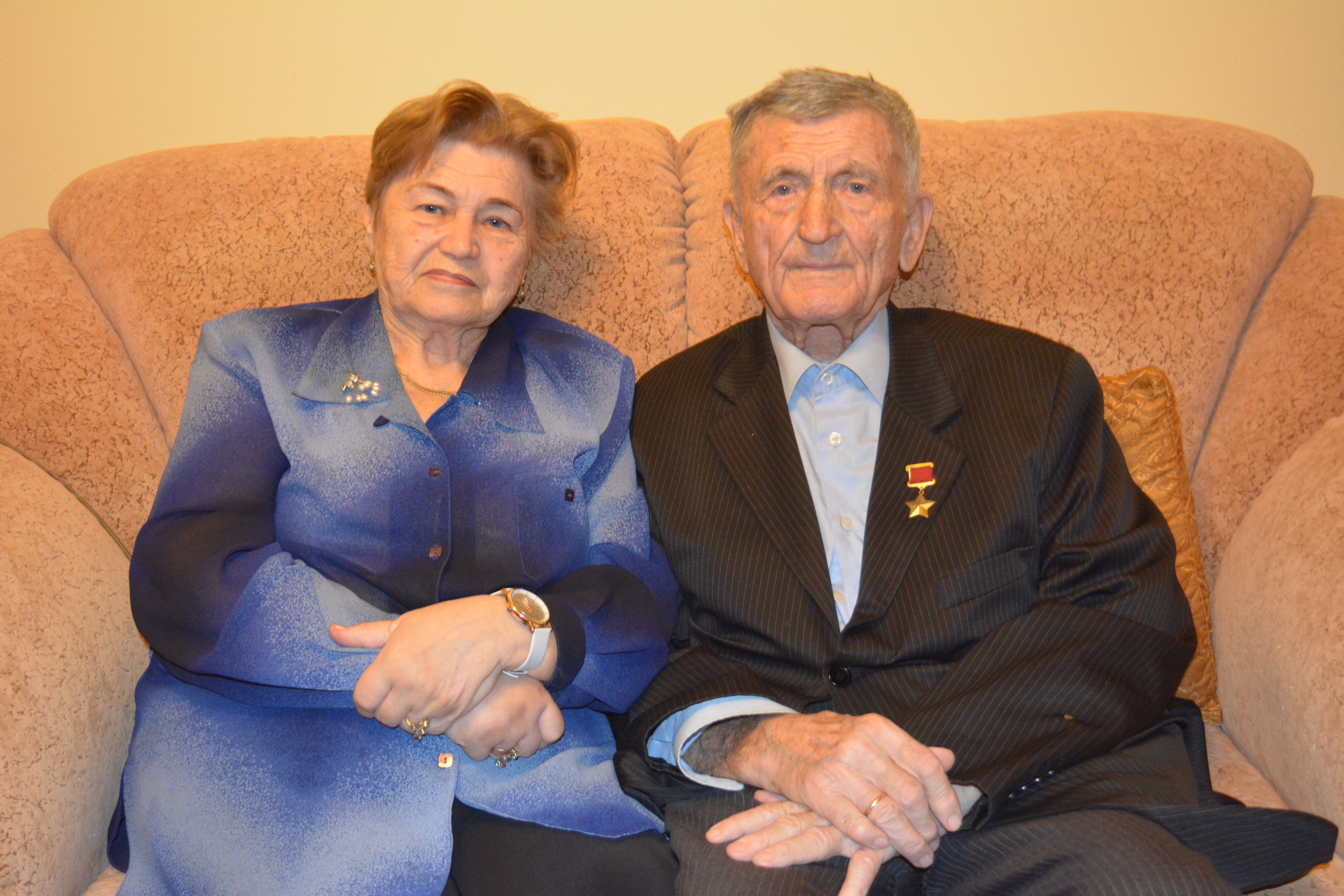 Сергей Макарович Крамаренко с супругой. 2016 год.